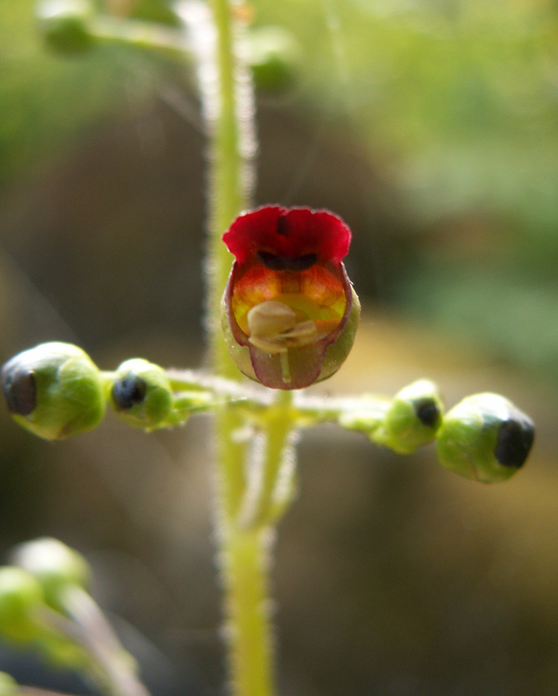 Flenört fotad på Öland.